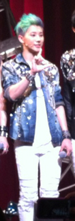 120711 일본 쇼케이스